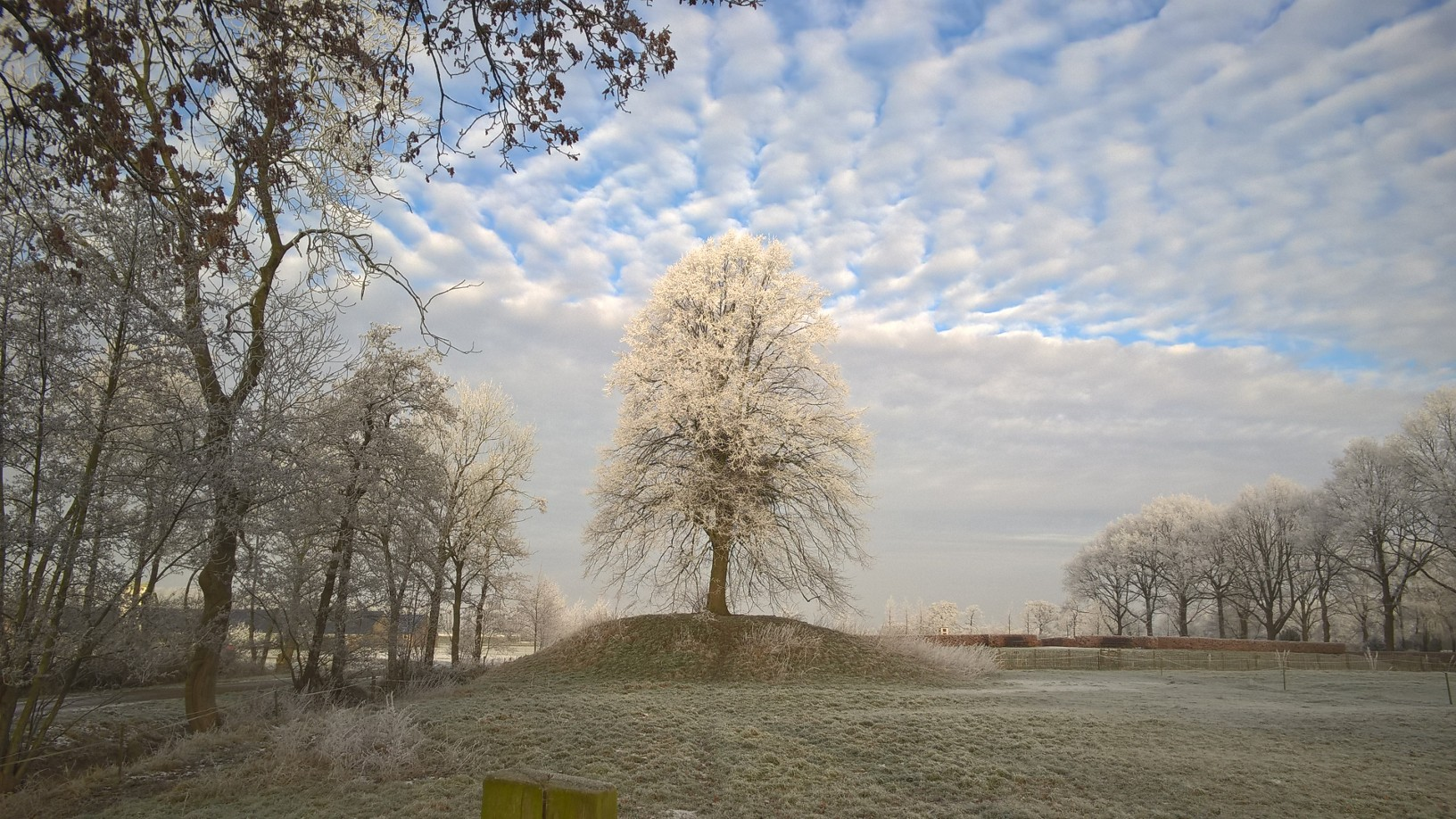 Bult van Marum, zogenaamde hege wier uit de middeleeuwen in het dorp Marum naast de Hervormde Kerk.